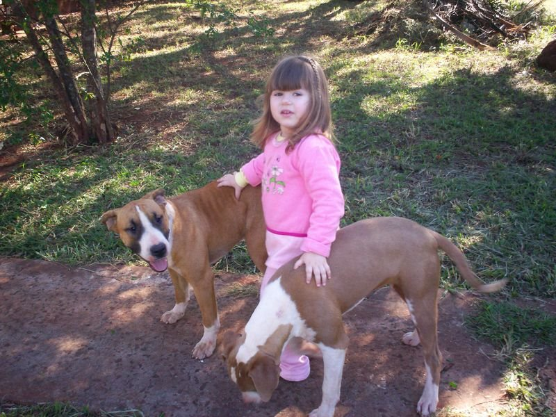 Dogues Brasileiro e criança juntos.